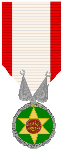 Mérite Militaire Chérifien